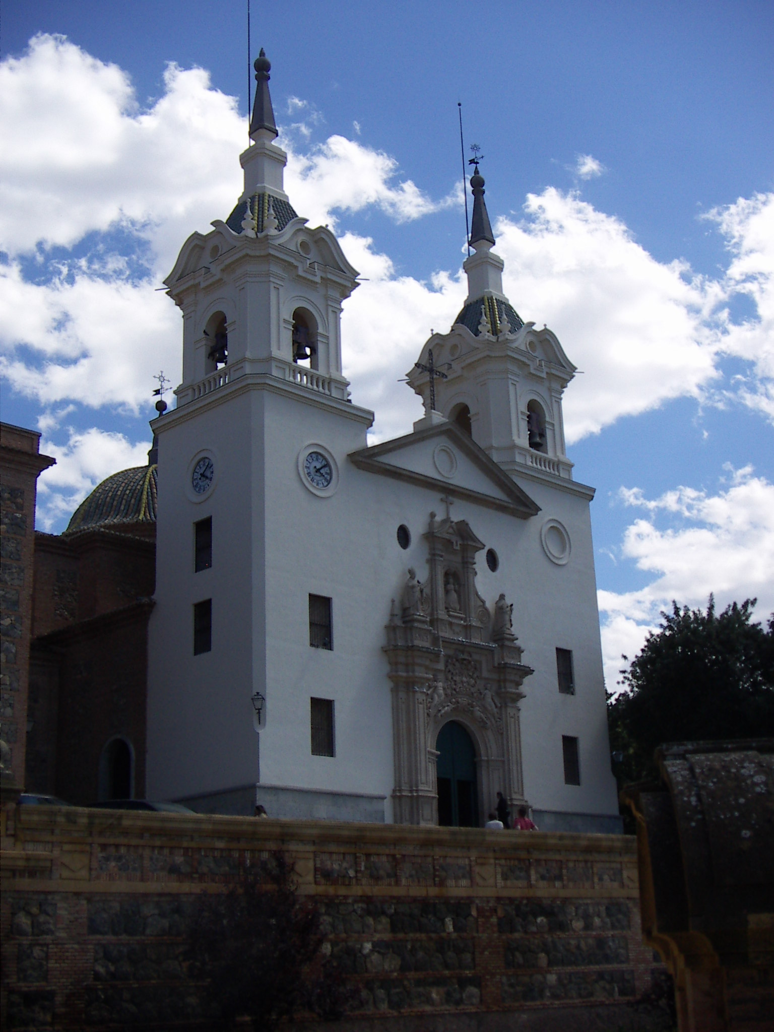 Fachada del Santuario de la Fuensanta. Murcia. España.